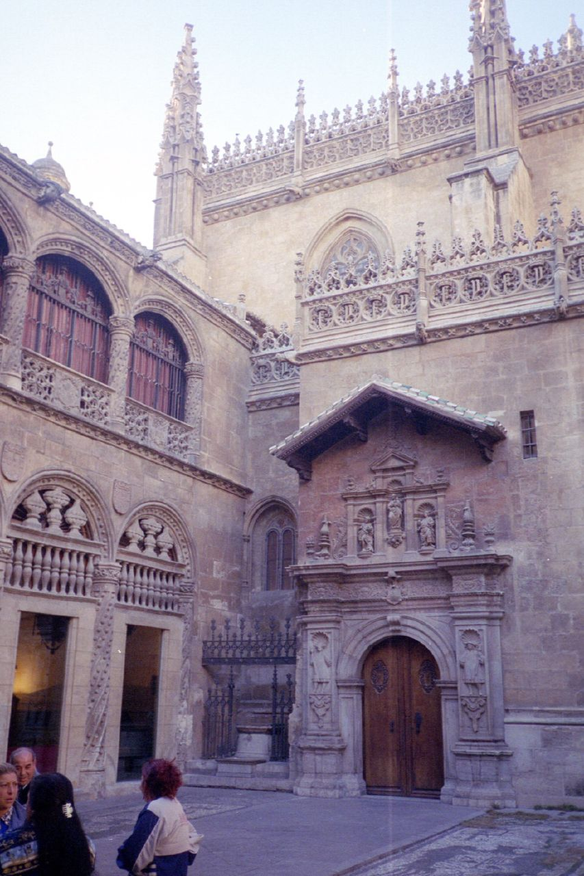 Granada, Spain.